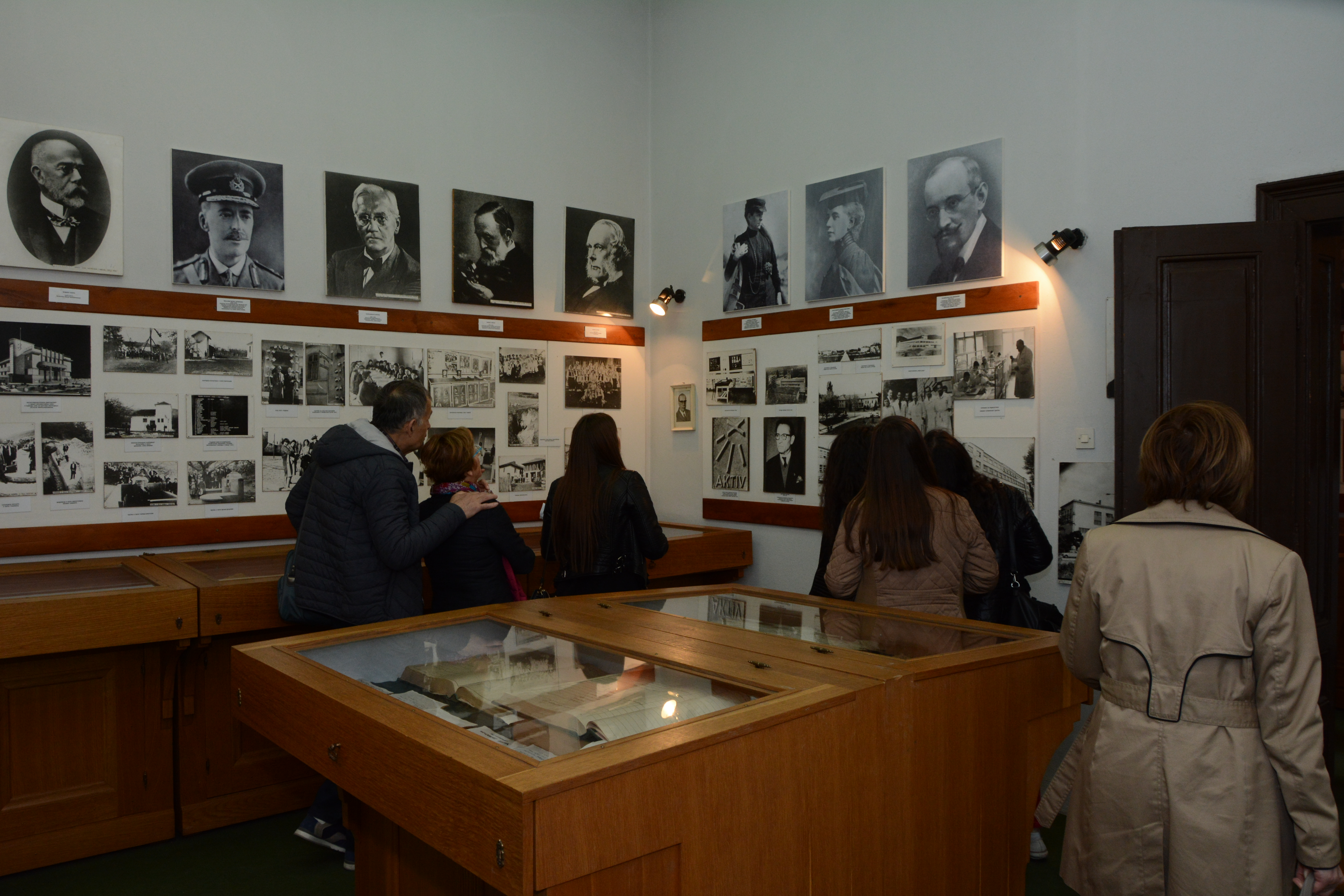 Музеј здравствене културе у Нишу, стална поставка 9